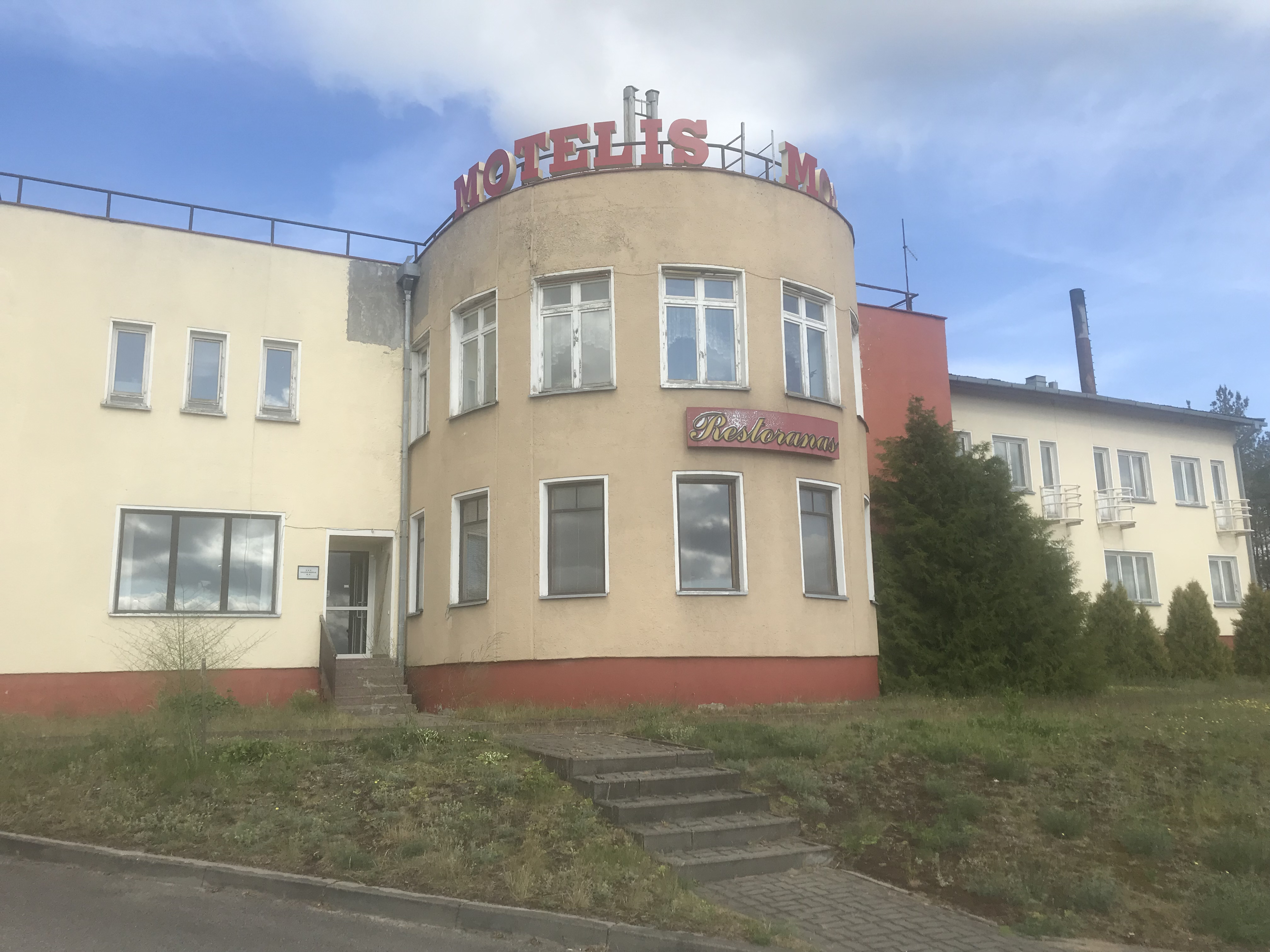 Genomen tijdens wandelproject Amsterdam-Moskou